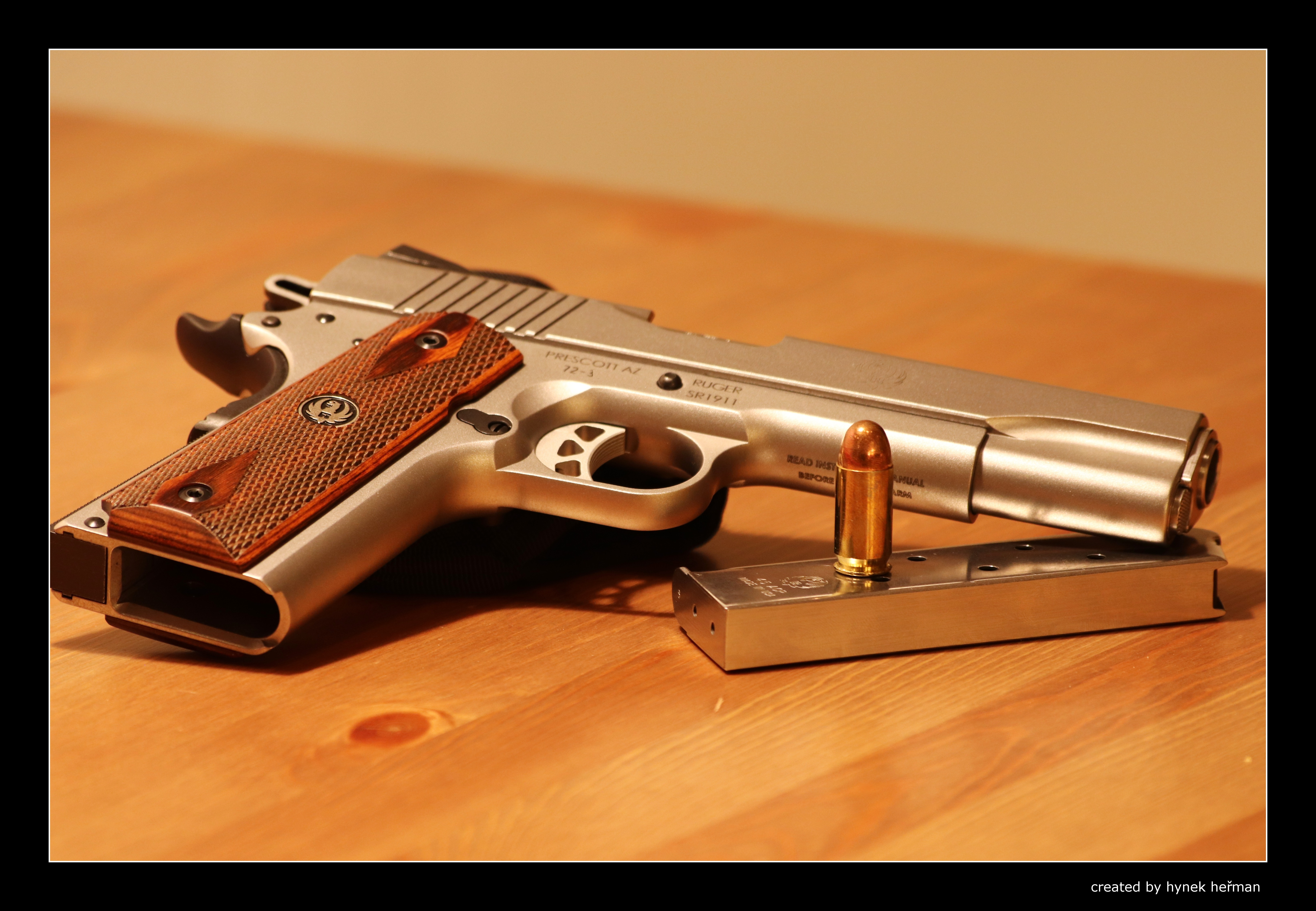 Pistole Ruger SR1911